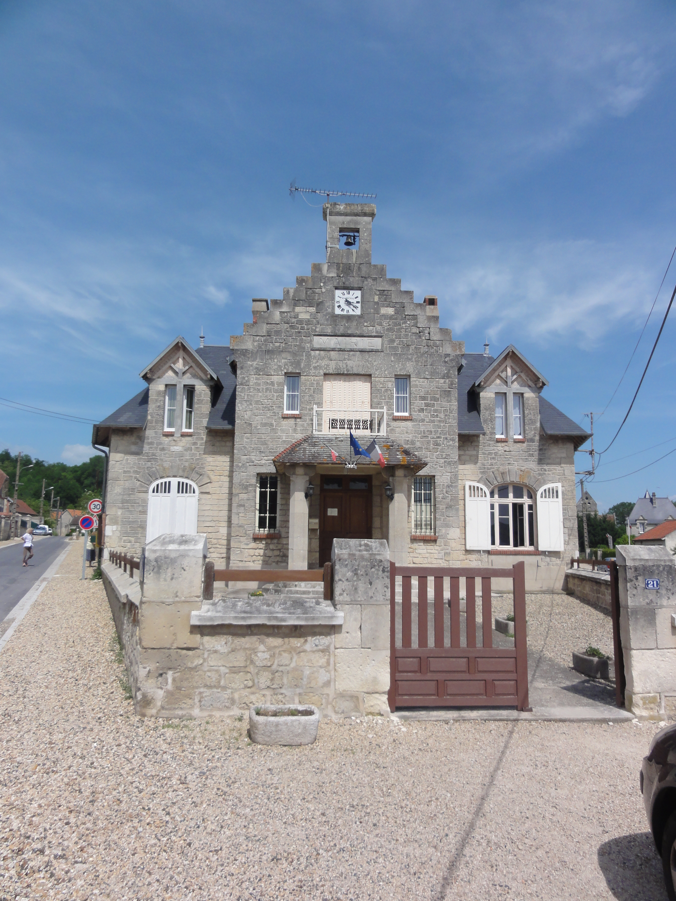 Soupir (Aisne) Mairie